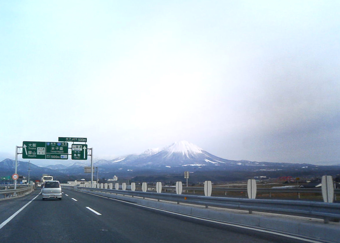 米子JCT